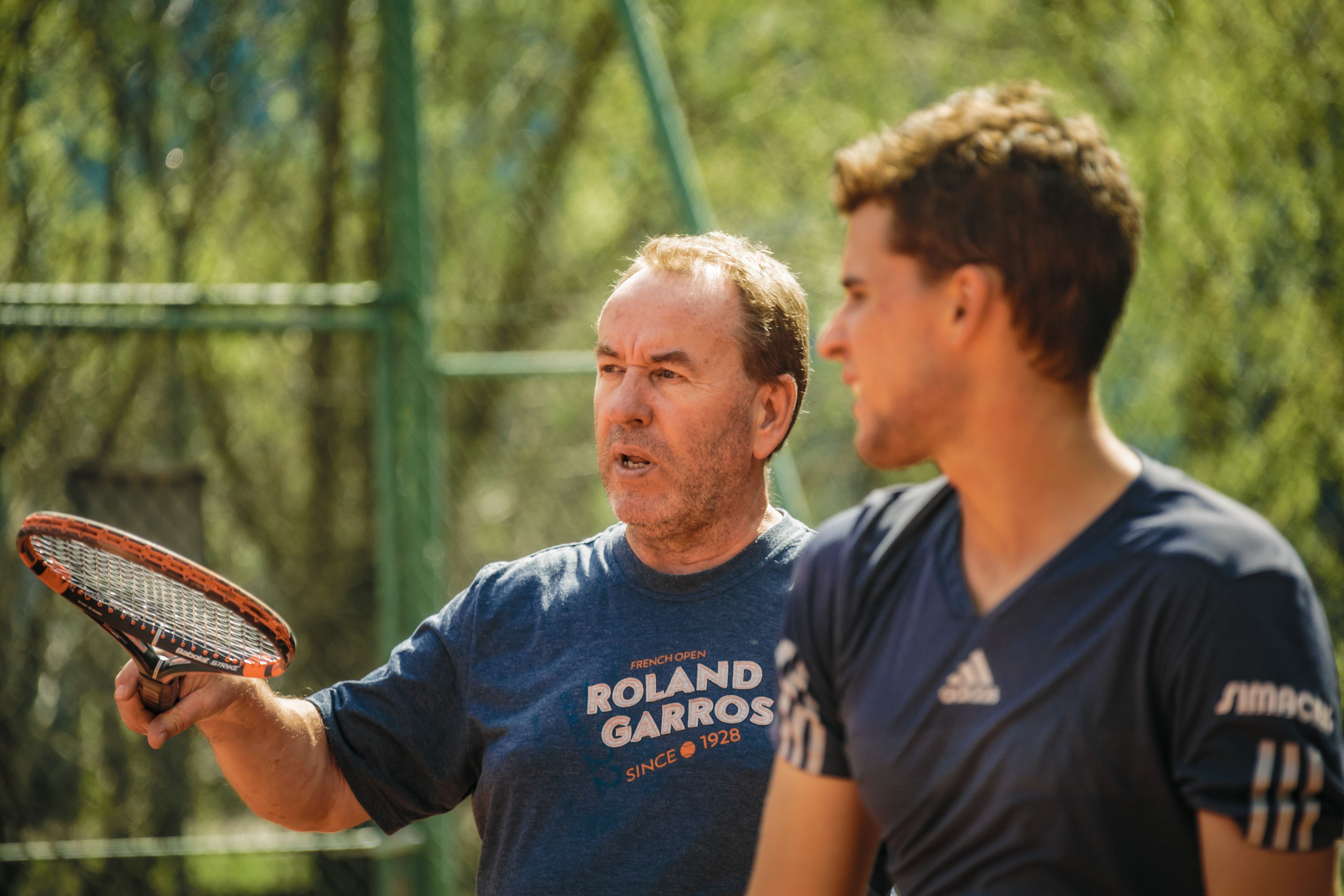 Günter Bresnik beim Training mit Dominic Thiem